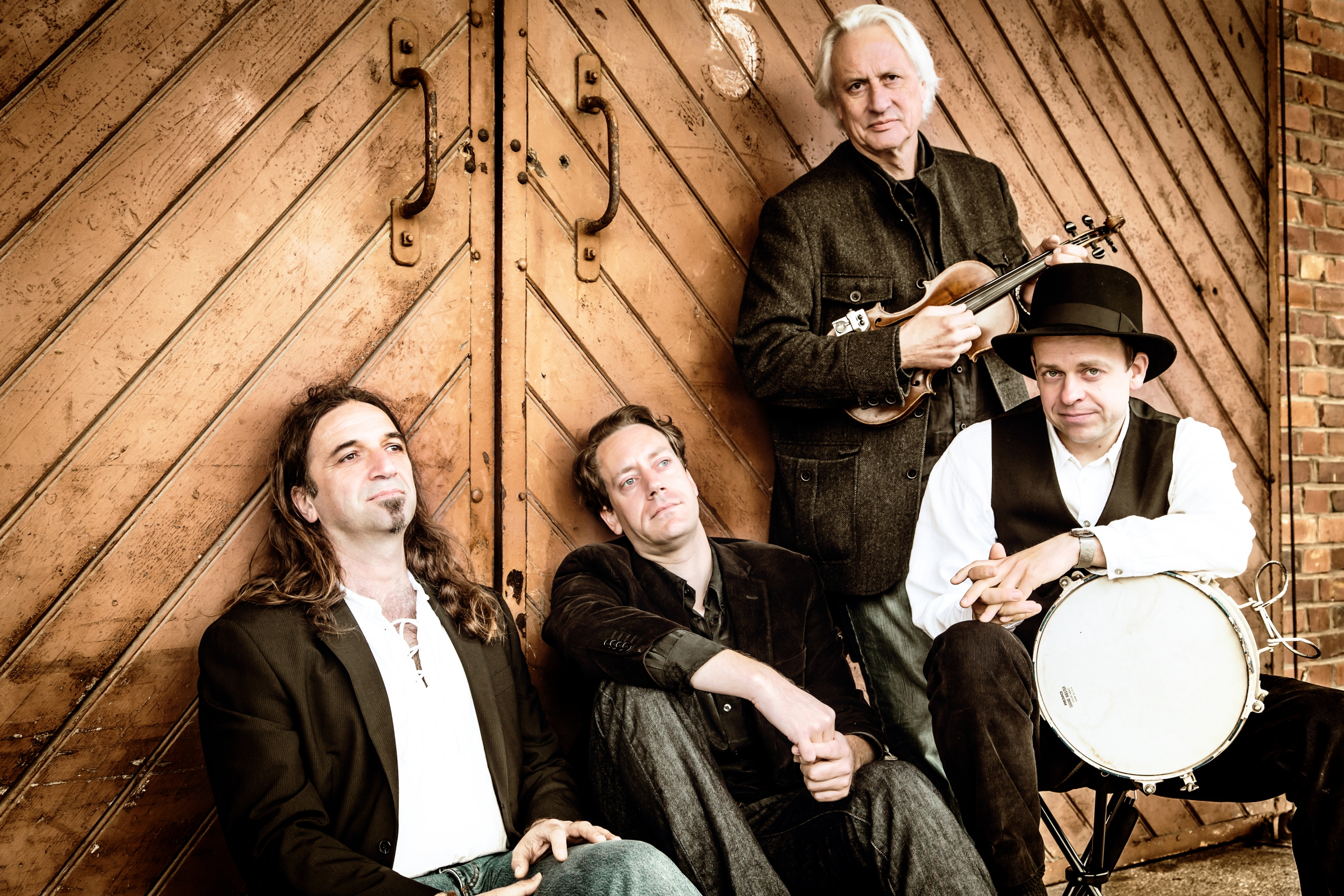 Aktuelles Pressefoto von Glenfiddle